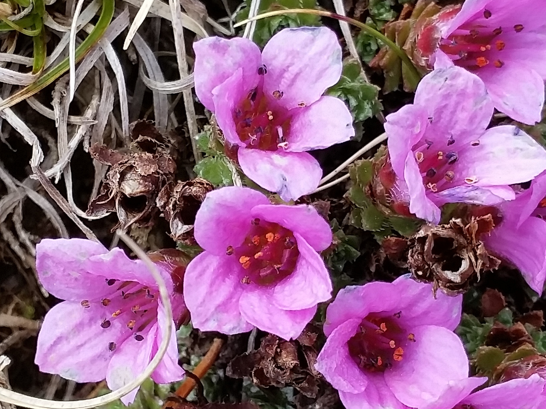 Saxifraga oppositifolia (saxífraga opositifòlia)